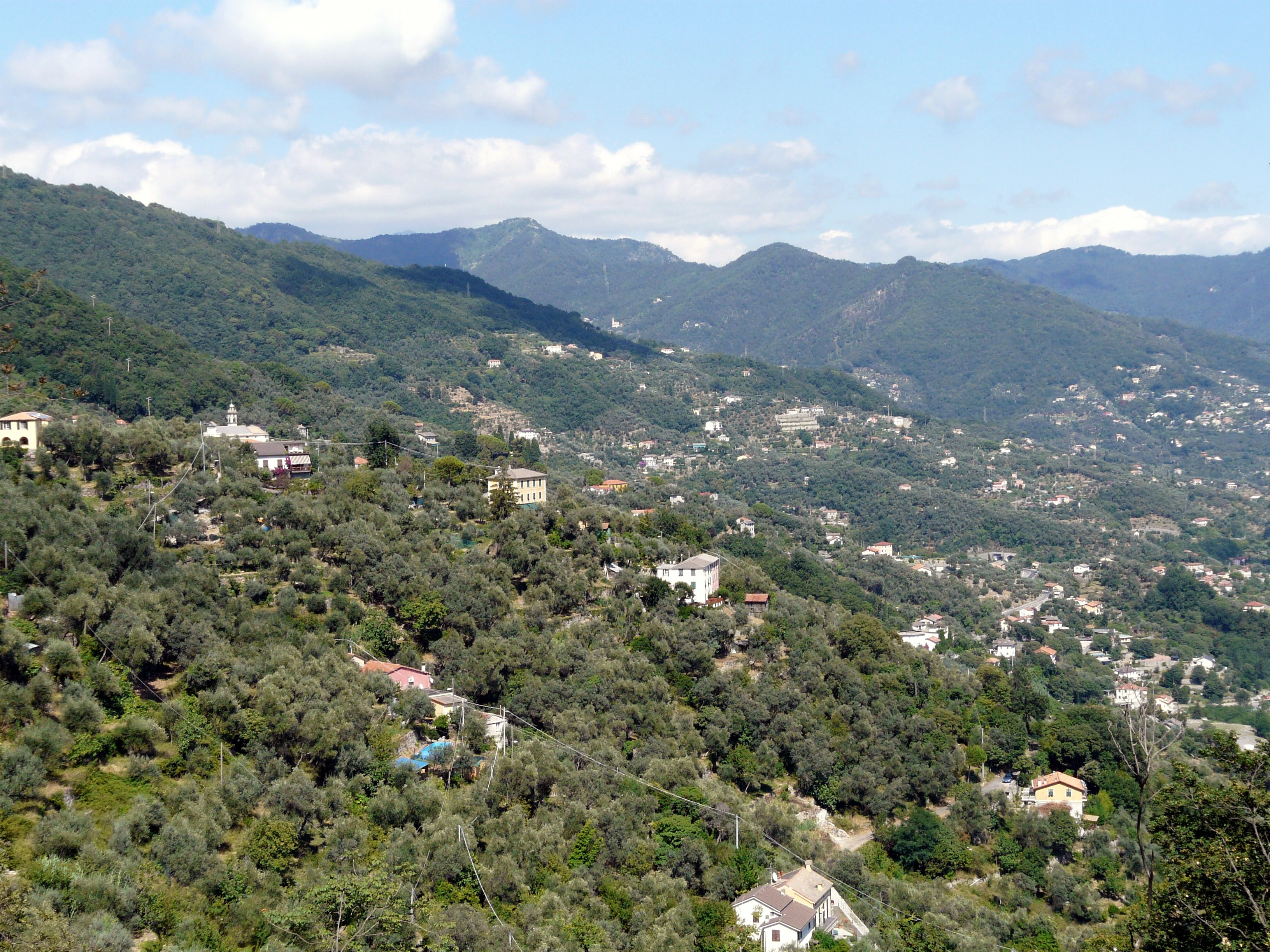 Panorama della frazione di San Martino di Noceto, Rapallo, Liguria, Italia